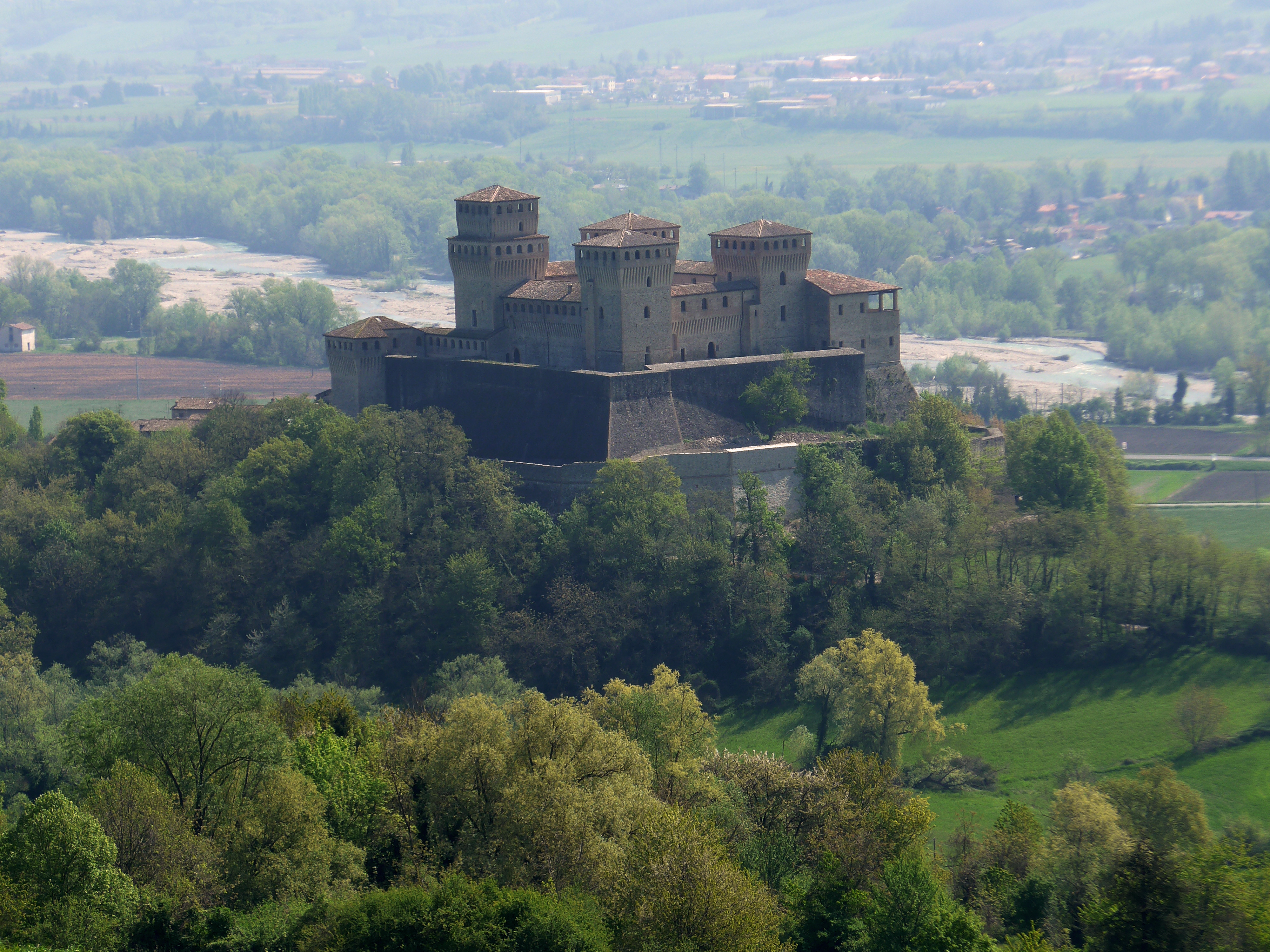 Castello di Torrechiara - MIBAC This is a photo of a monument which is part of cultural heritage of Italy.